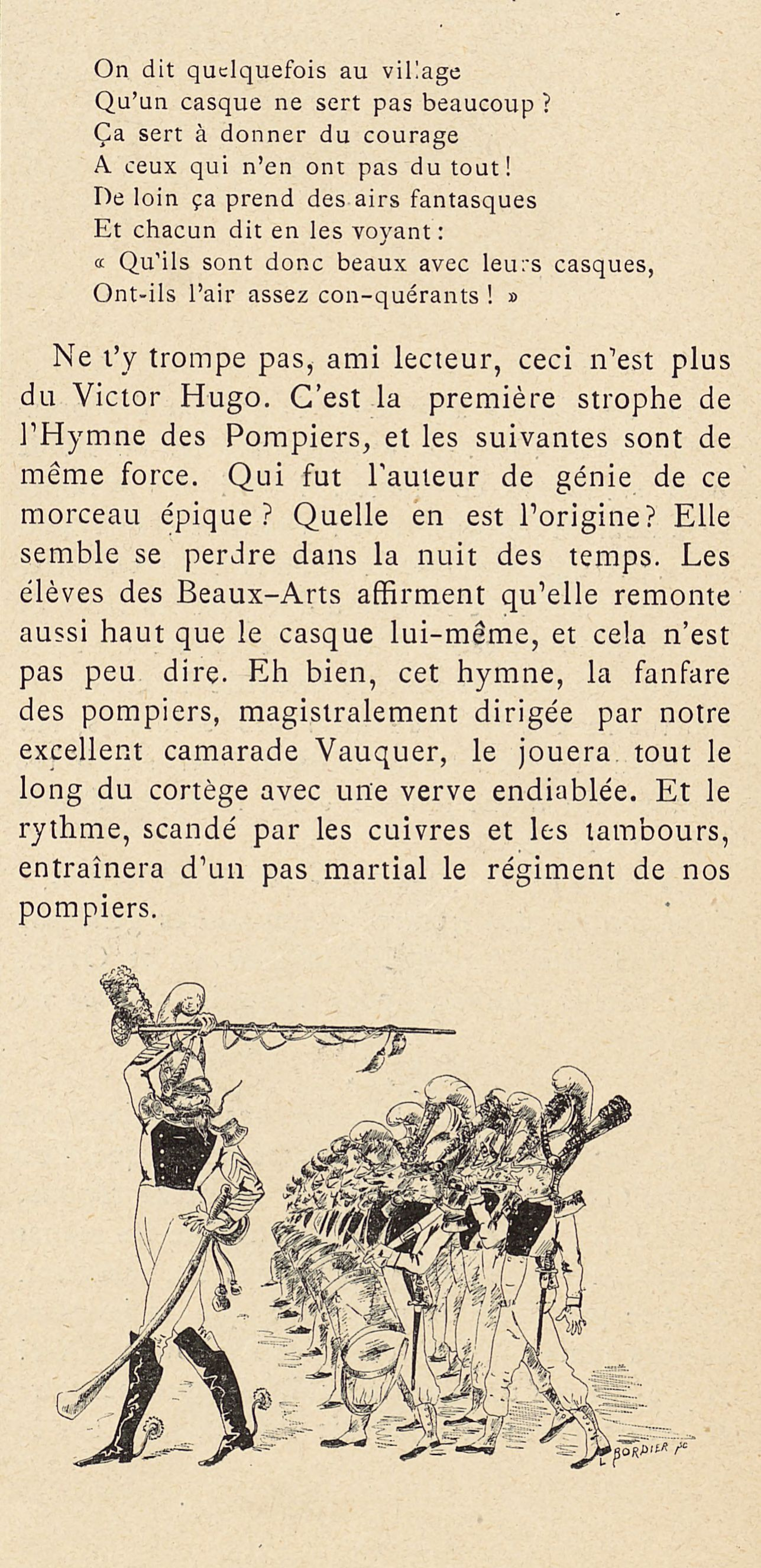 Illustration pour le cortège de la Mi-Carême à Paris 1894 et extrait de l'hymne étudiant "Le Pompier"